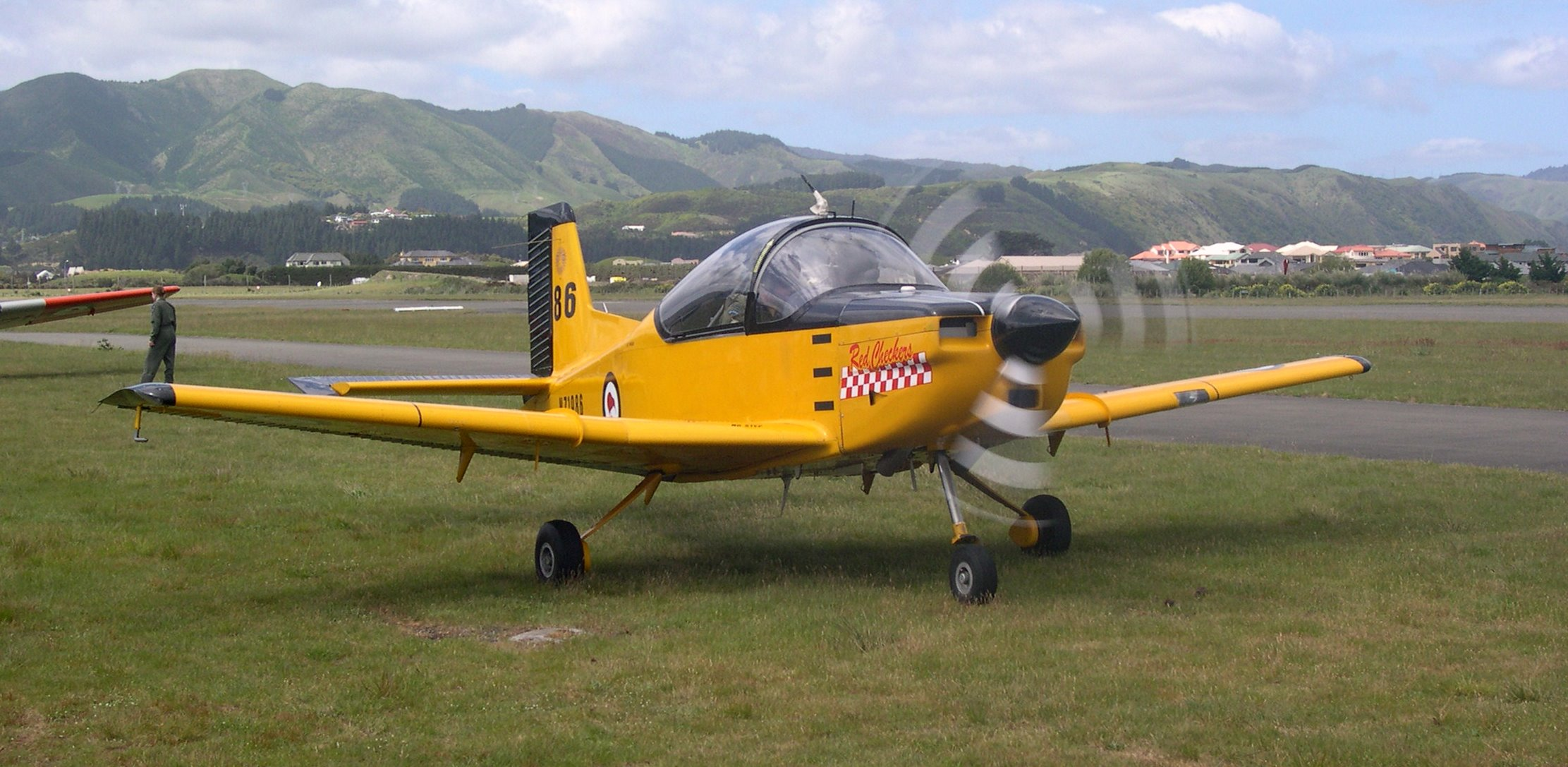 RNZAF Red Checkers